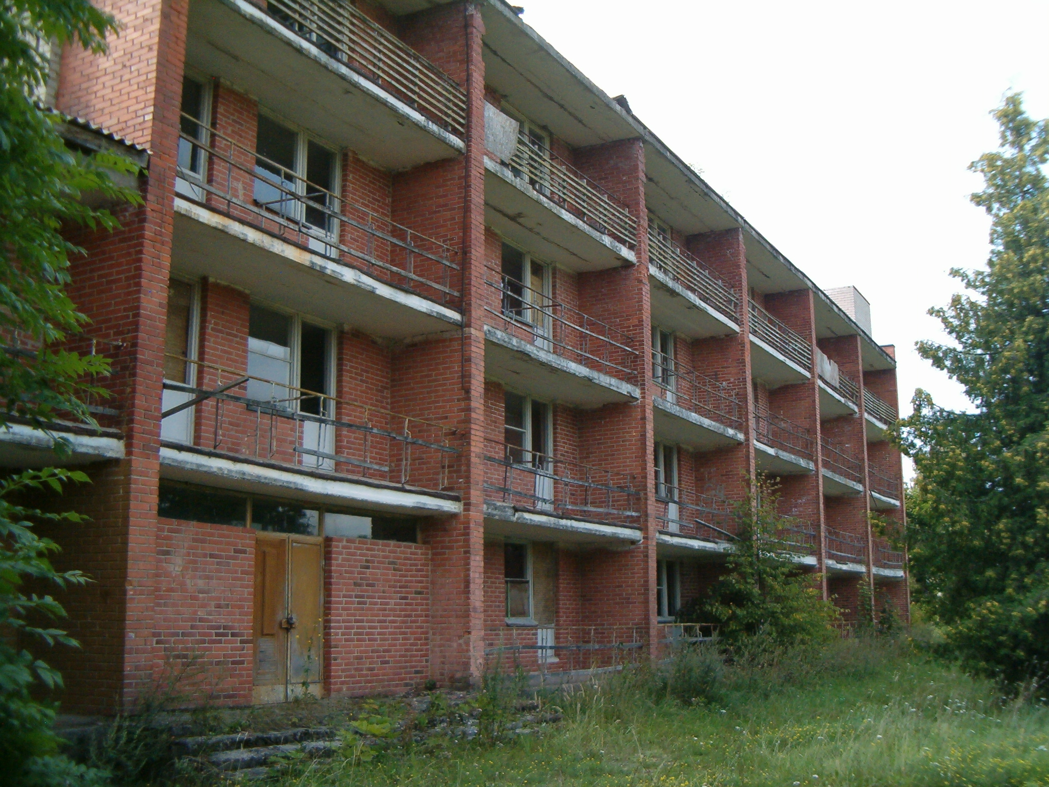 Vepriai, Lithuania